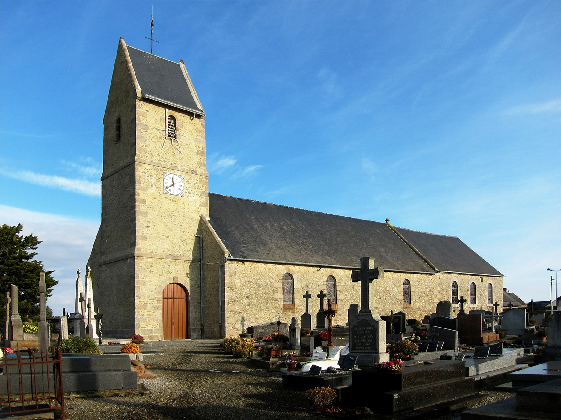 L'église de Gouville-sur-Mer (Manche).